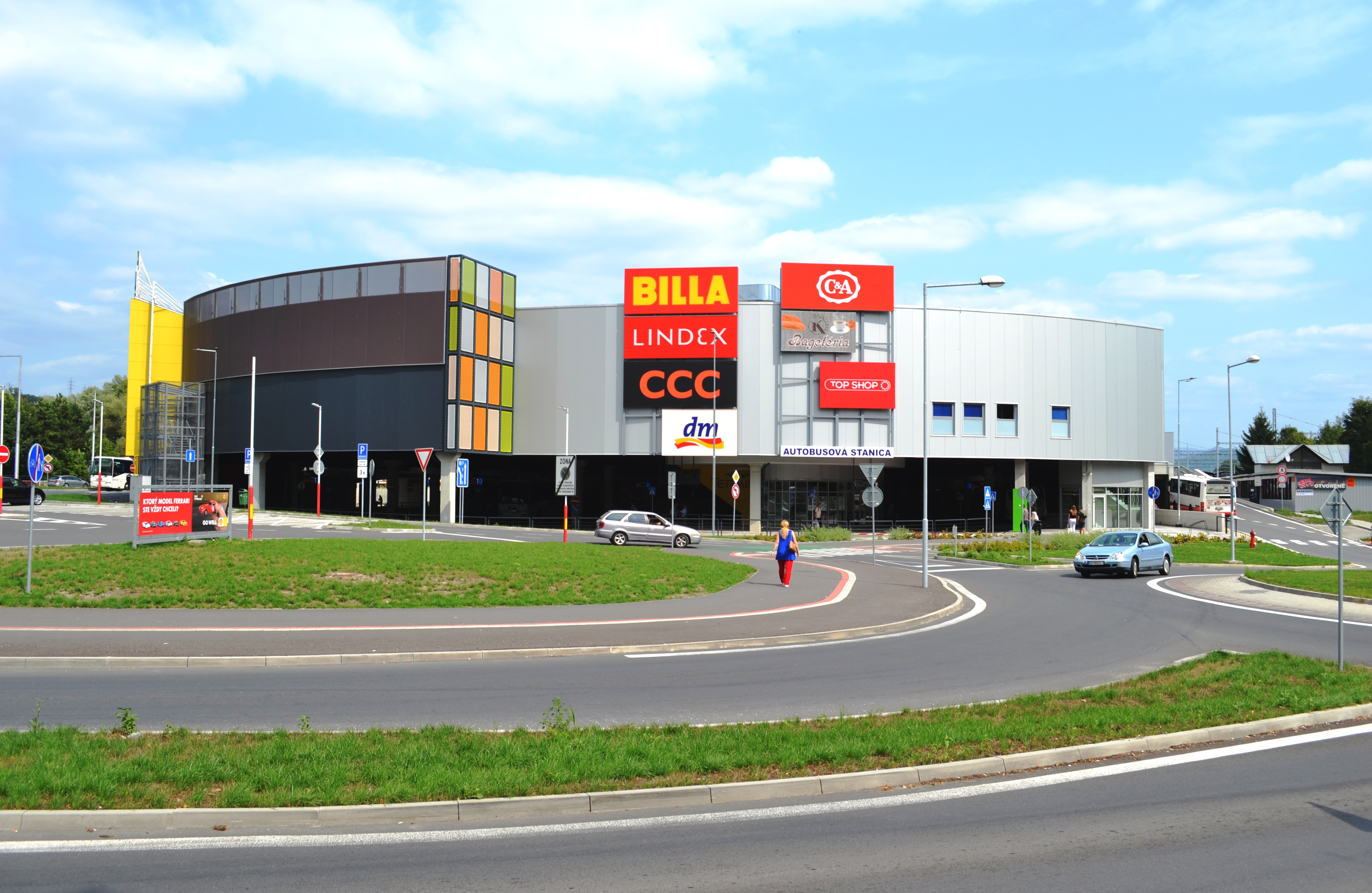 Najmodernejšia autobusová stanica na Slovensku Terminal Shopping Center (TSC), ktorá je prepojená s obchodným centrom.